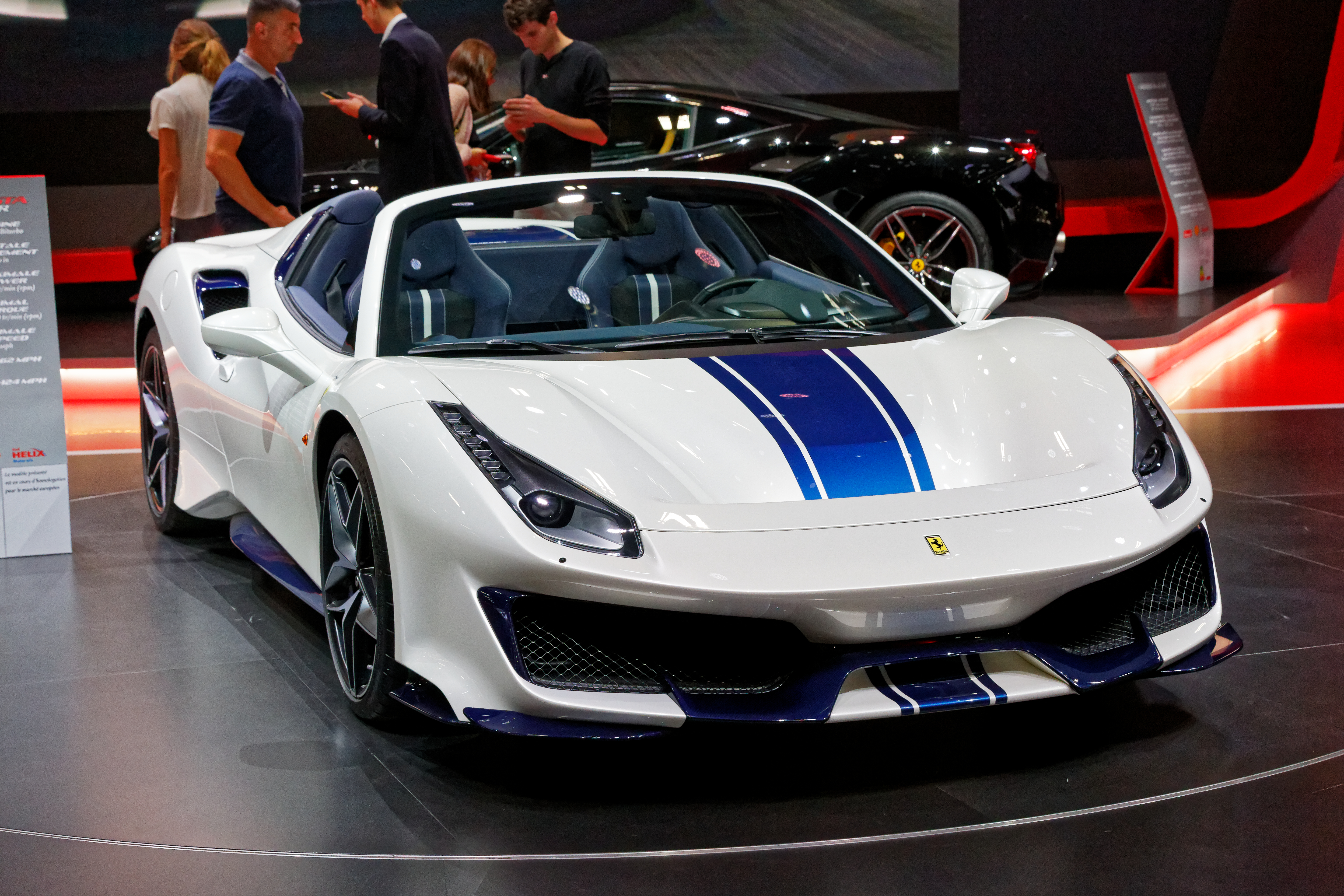 Une Ferrari 488 Pista Spider exposée lors du mondial de l'automobile de Paris 2018.